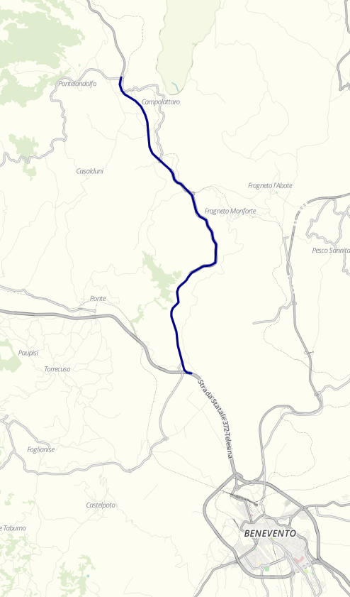 Strada statale 87 bis Sannitica